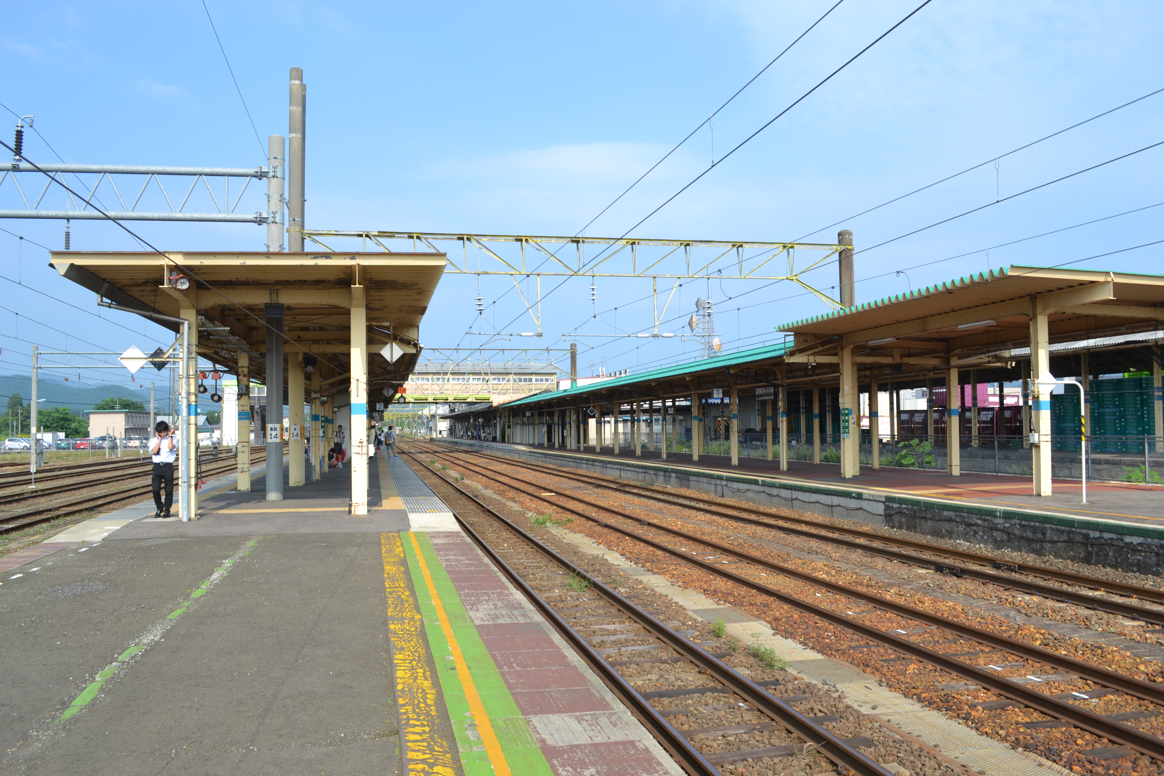 大館駅プラットホーム